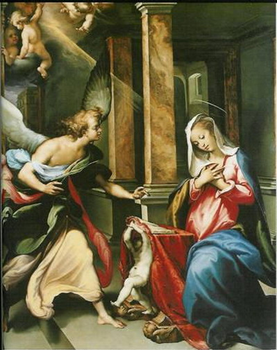 The Annunciation (1596 ca.) by Francesco Curia.jpg